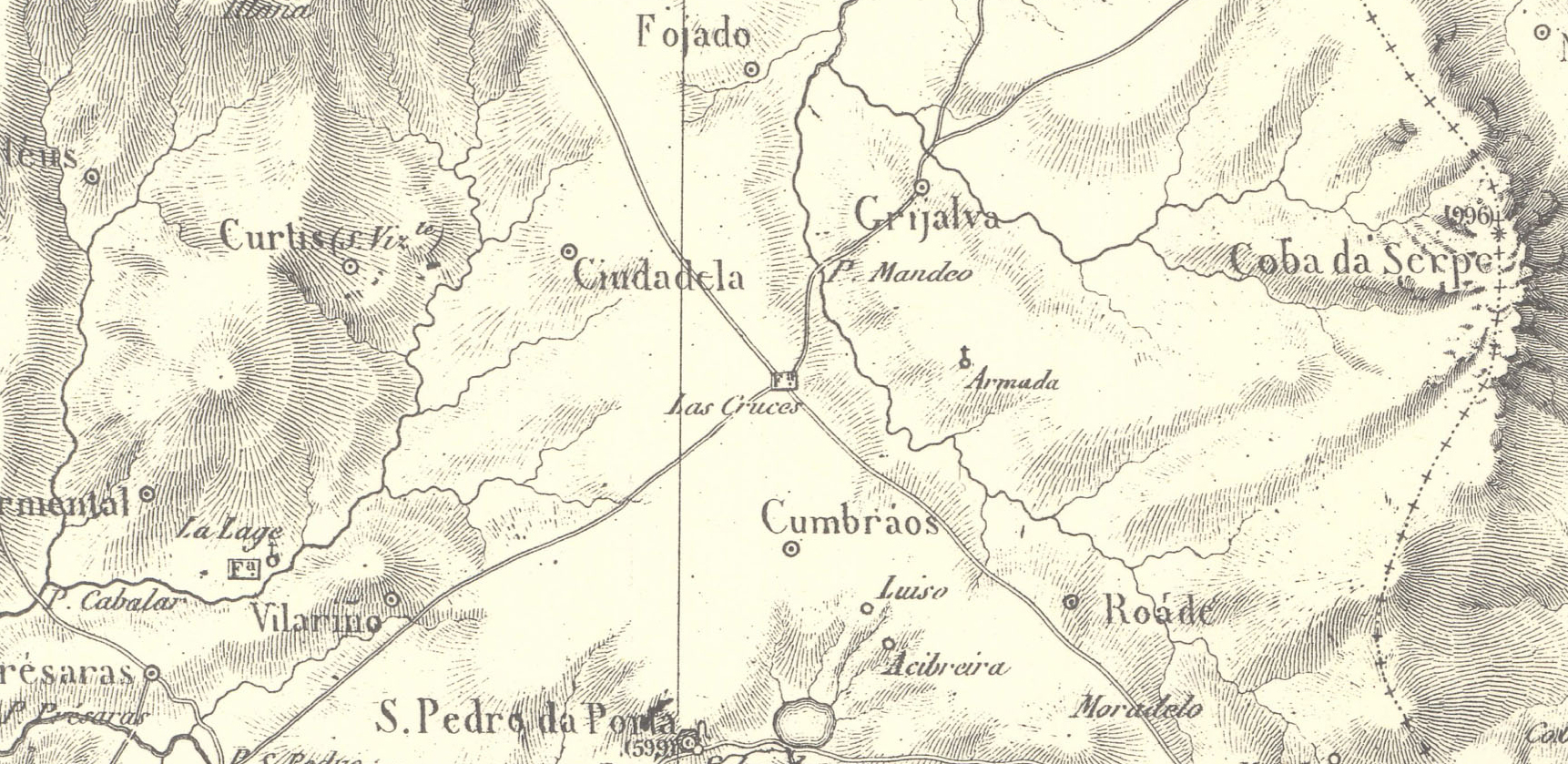 As Cruces (Sobrado) na Carta xeométrica de Galiza.